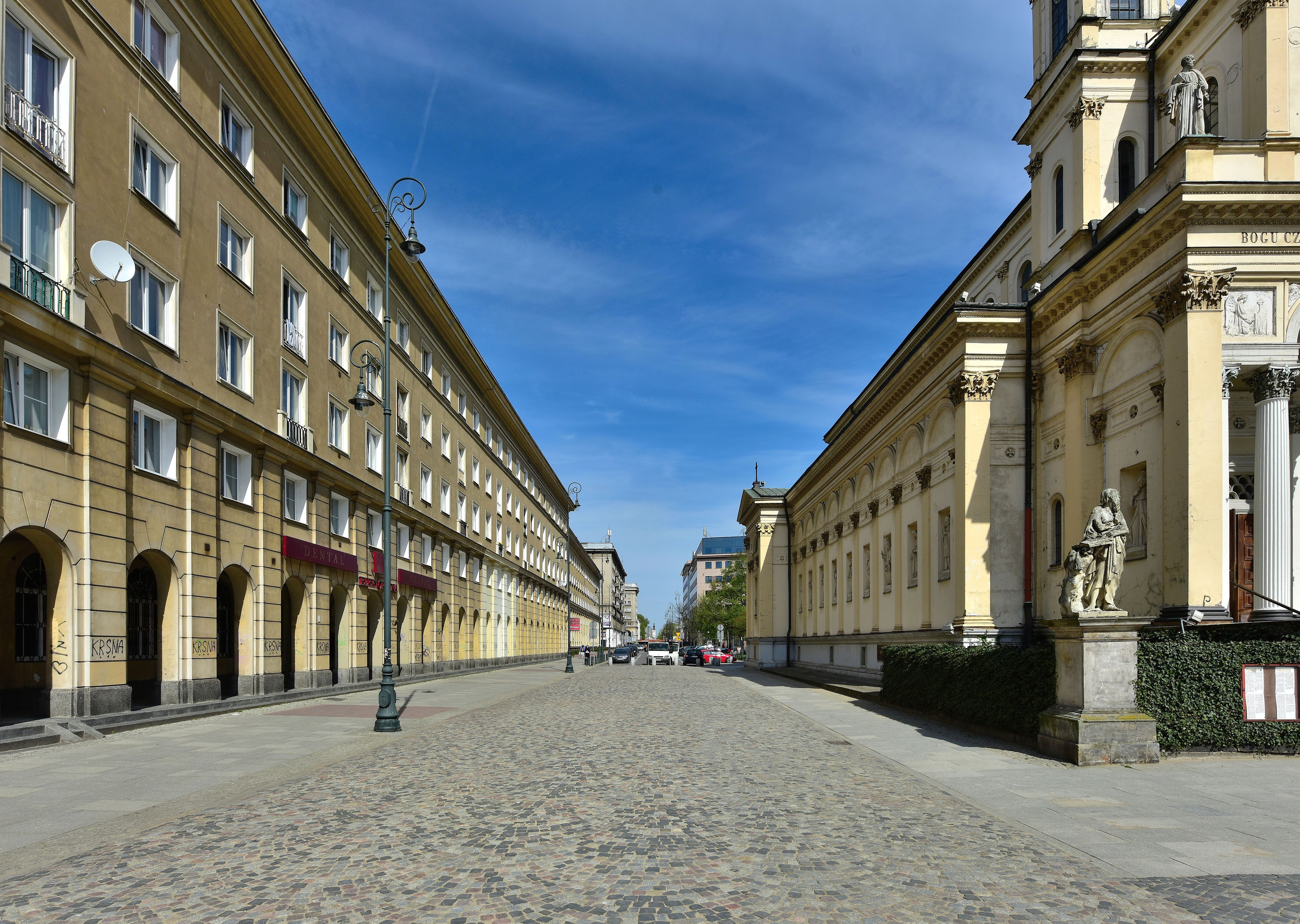 Ulica Elektoralna w Warszawie